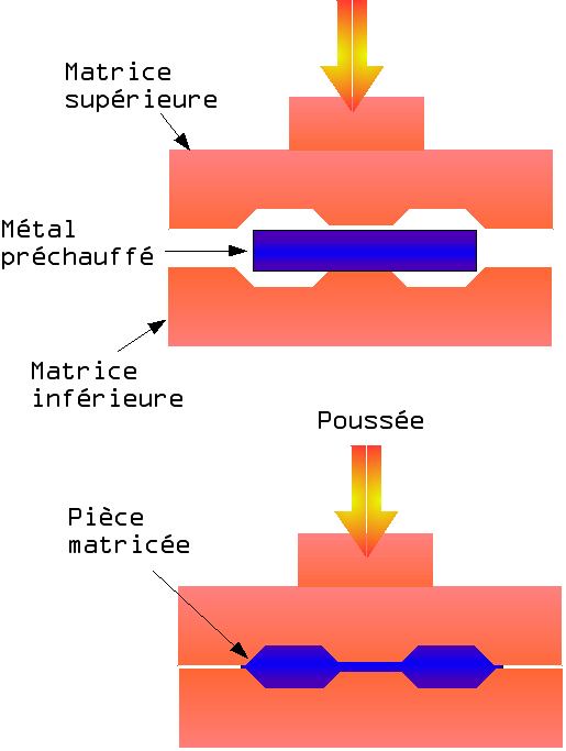 Matriçage